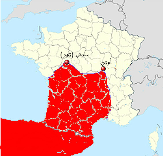 أقصى ما وصلته الفُتُوح الإسلاميَّة في بلاد الغال، عند مدينتيّ طُرش (تور) وأوتن.